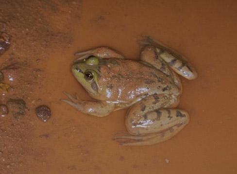 Pseudis paradoxa in Mana, French Guiana